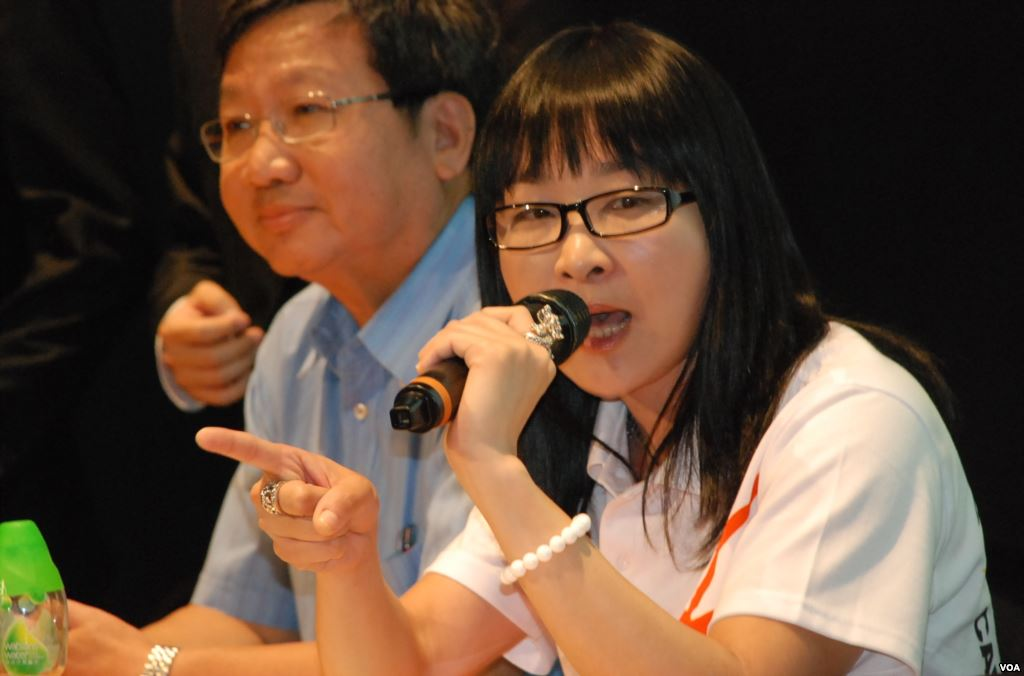 陳靜心